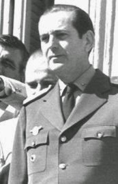 Roberto Benito Moya desde el balcón de la Casa Rosada el 2 de abril de 1982